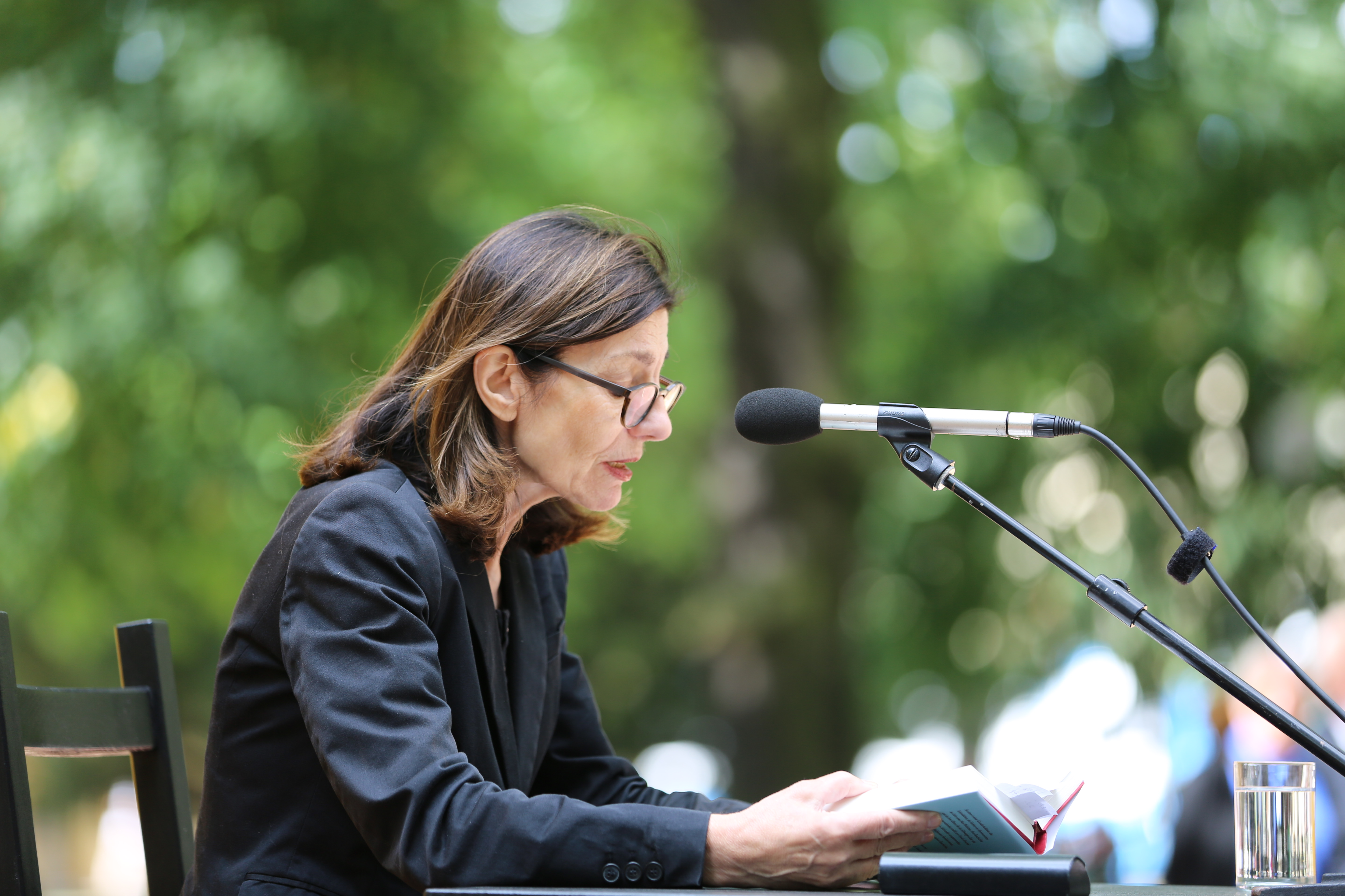 Ursula Krechel auf dem Erlanger Poetenfest 2018. Sie liest aus ihrem Roman "Geisterbahn"